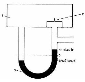 Shema variometra